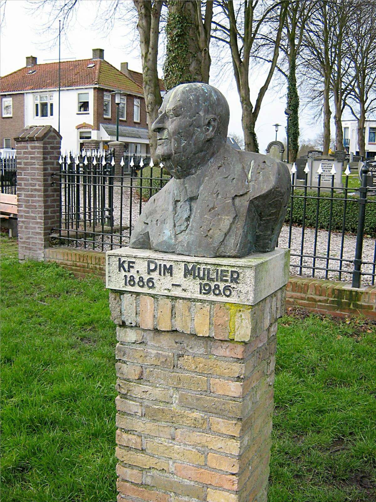 Frank Zeilstra,1986